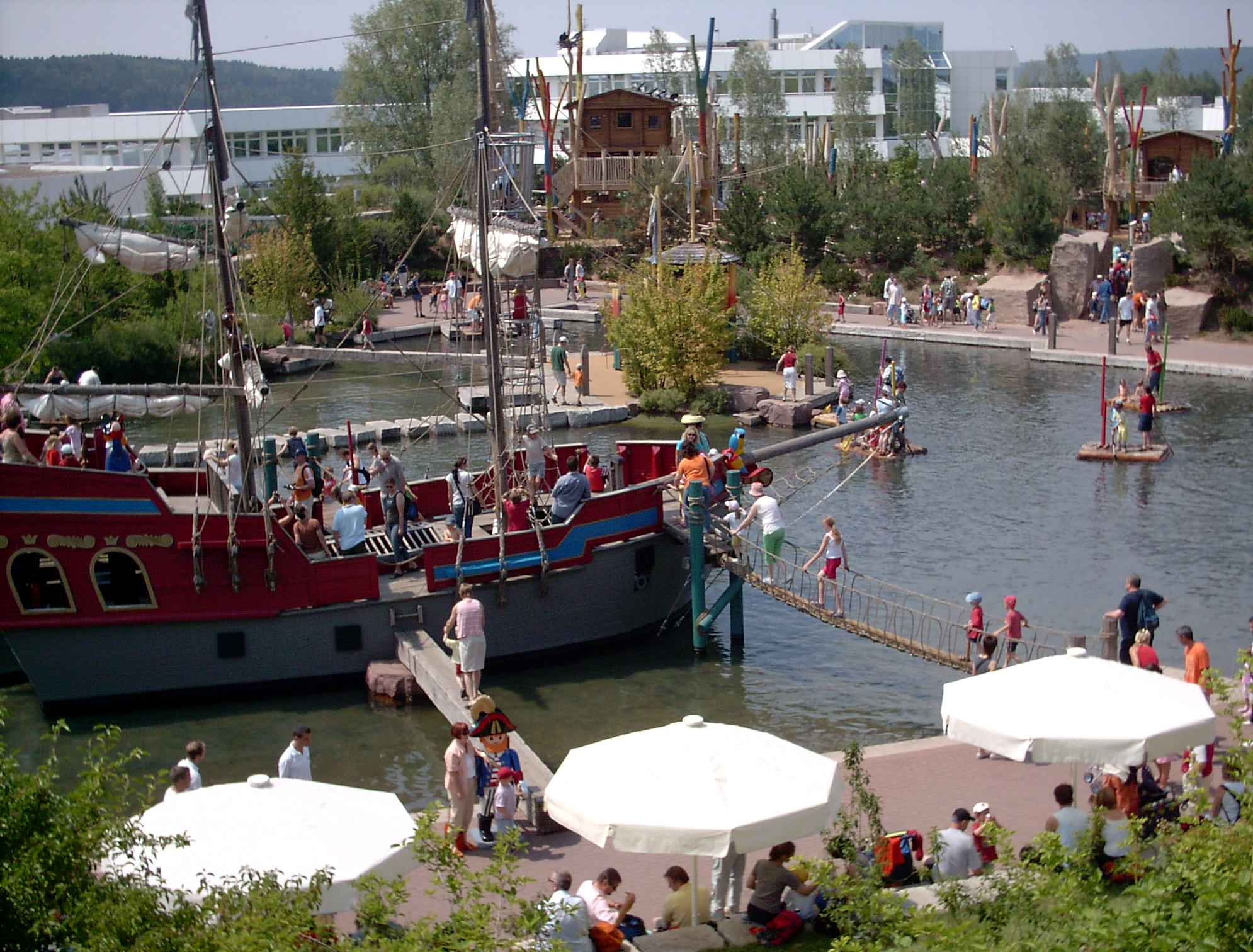 Playmobil Funpark, Piratenschiff, Zirndorf/Germany